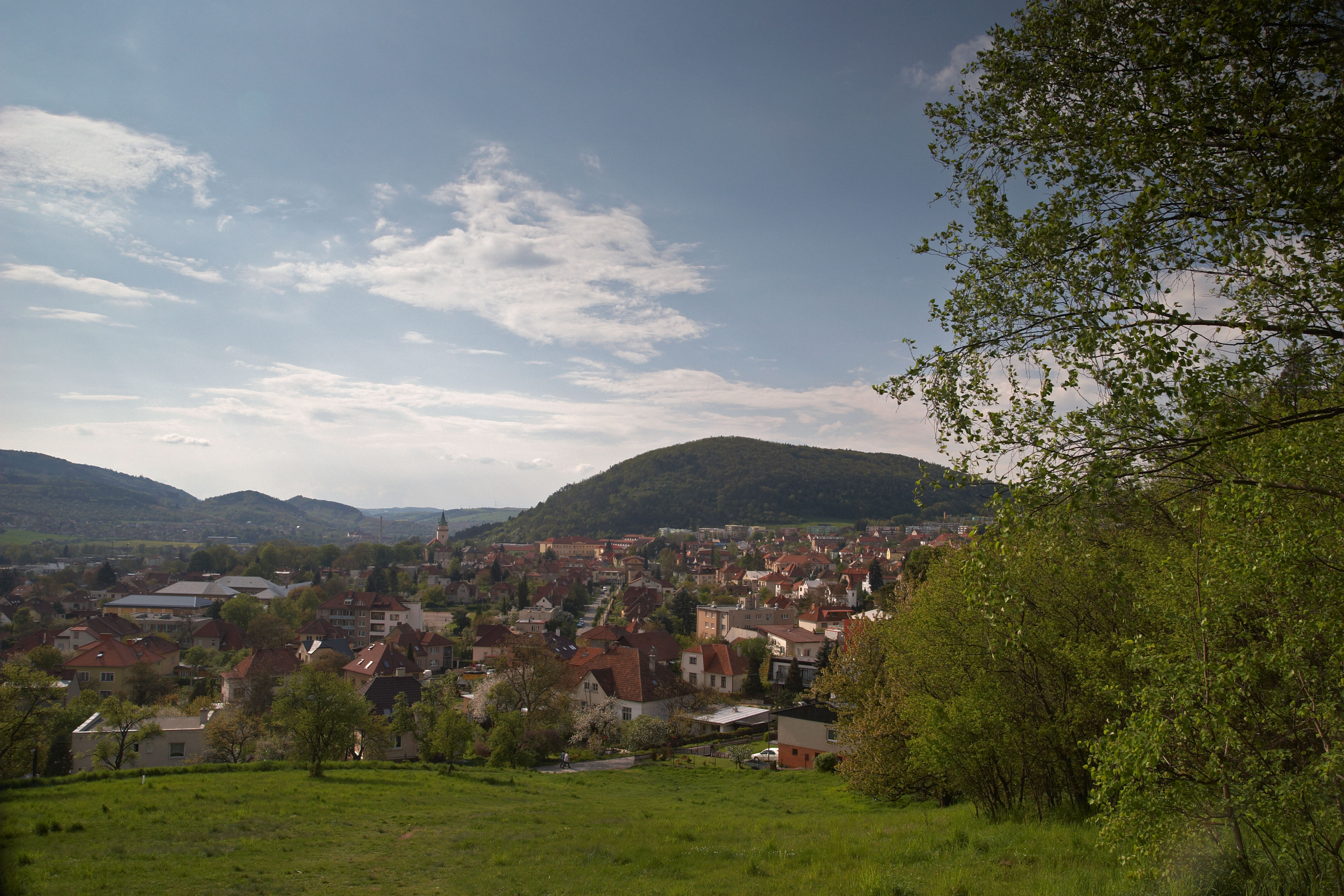 Vrchol Květnice nad Tišnovem